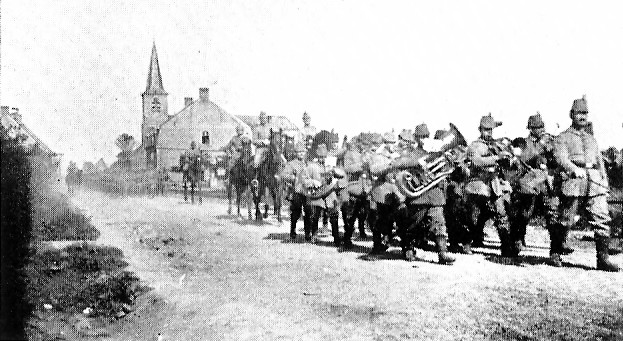 Die Bataillonsmusik unter Musikmeister Möller beim Marsch durch Jonkershove